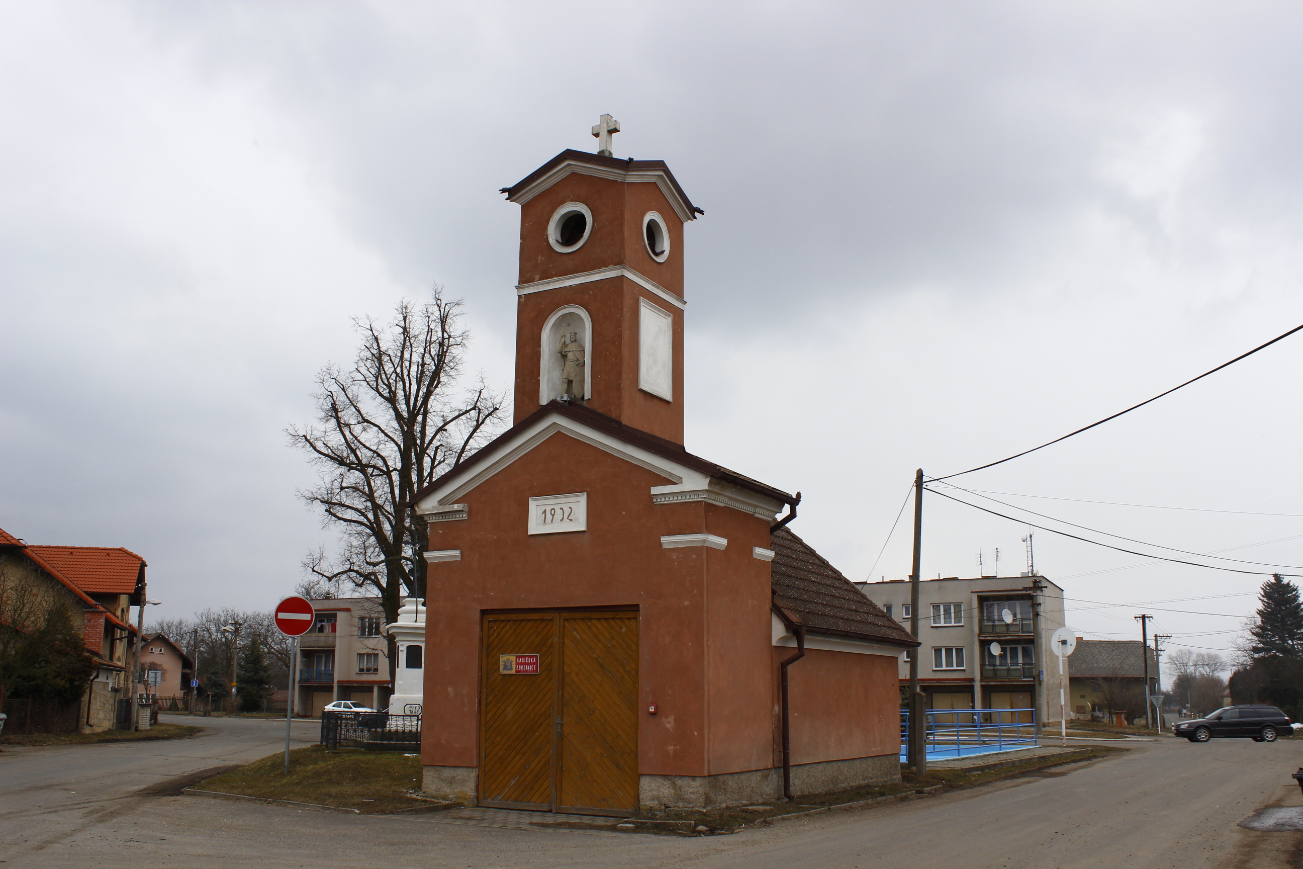 Kaplička v Březovicích na Mladoboleslavsku (pohled od jihu).